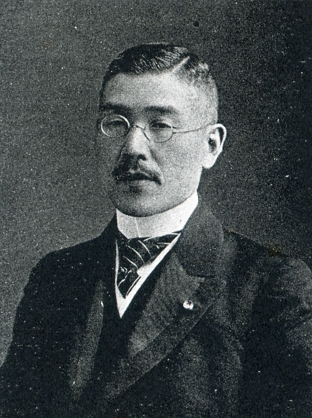 この写真は、原夫次郎（1875-1953）の写真です。